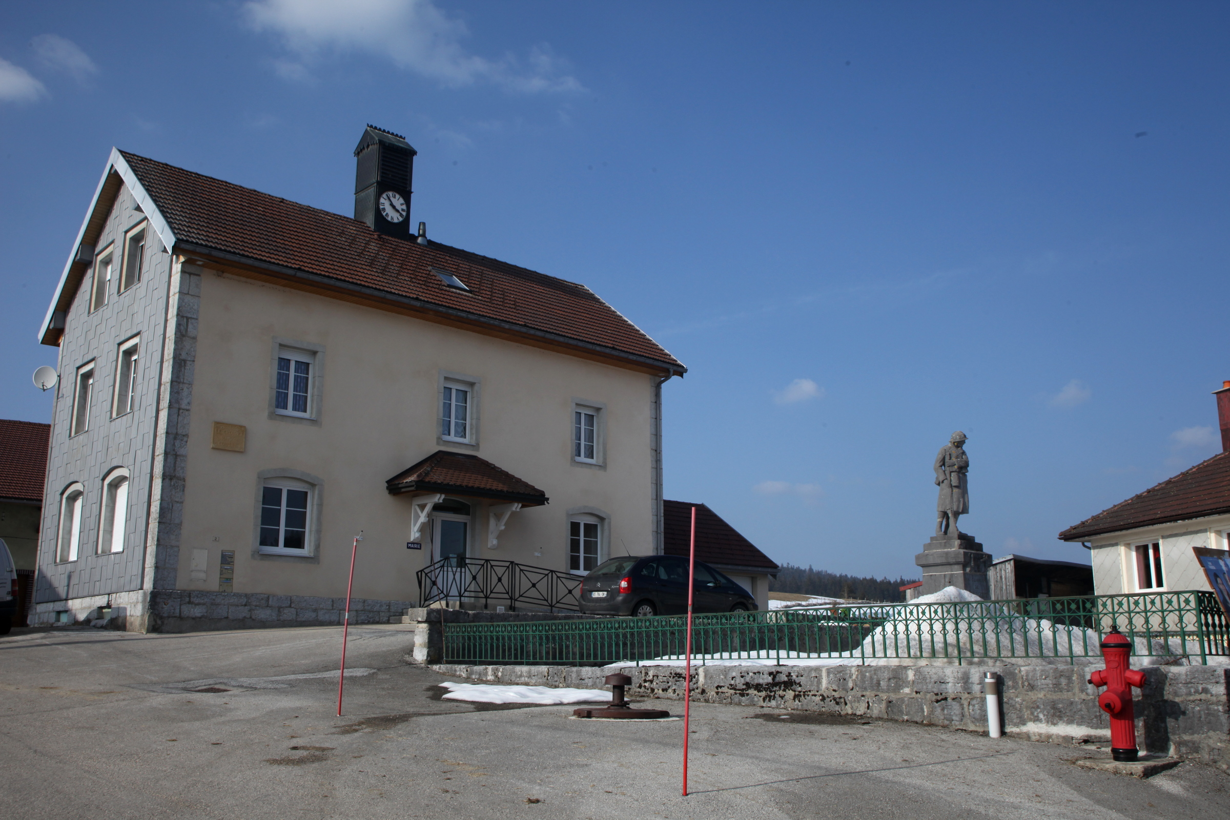 Mairie du Crouzet (Doubs)